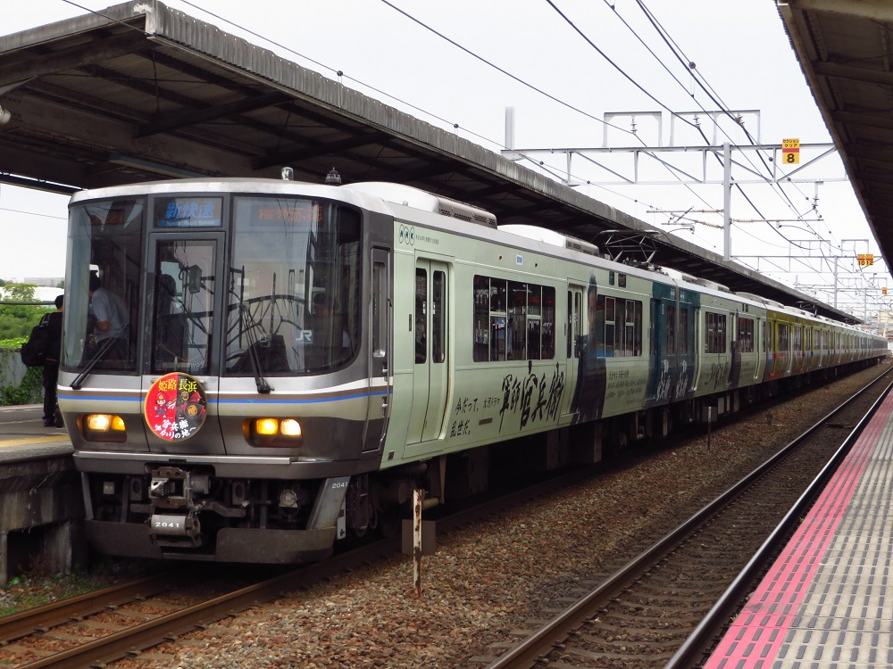 JR西日本223系電車、NHK大河ドラマ『軍師官兵衛』ラッピング。明石駅にて。